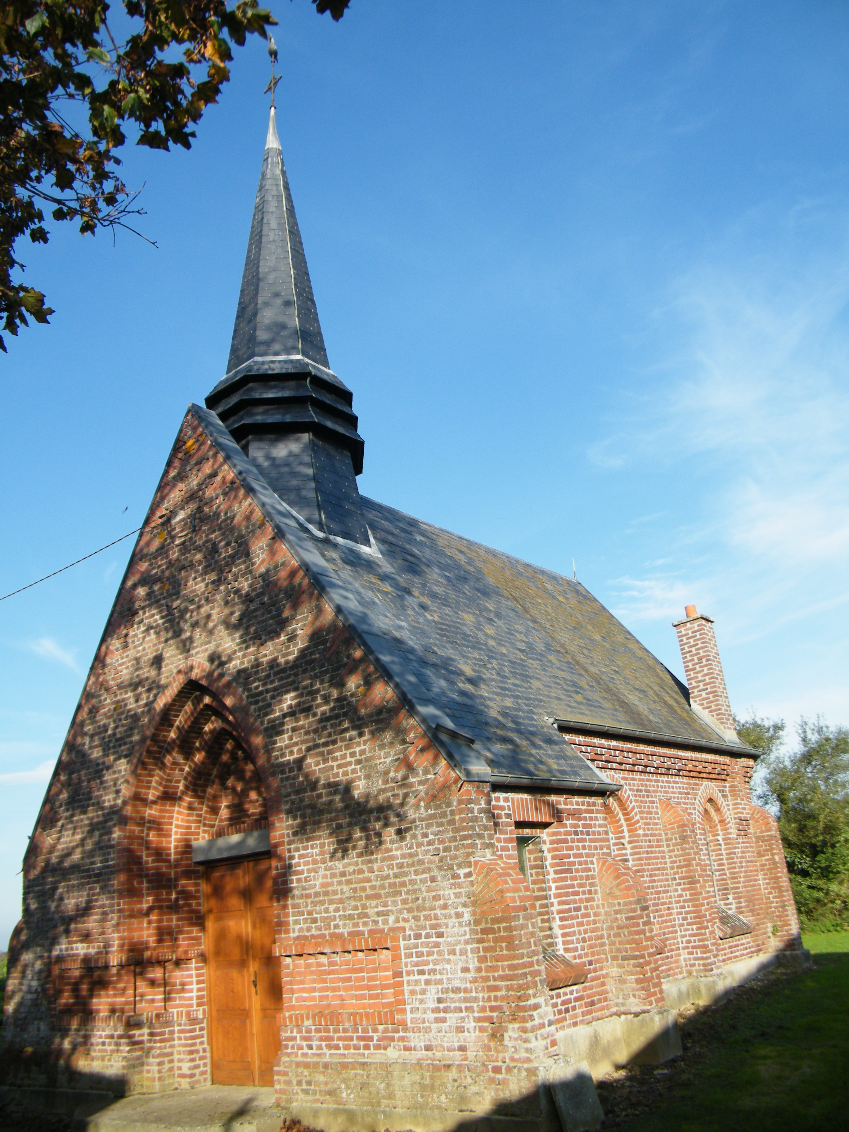 église.